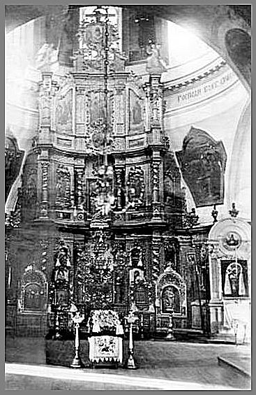 Станица Раздорская, церковь Донской иконы Божией Матери, иконостас.